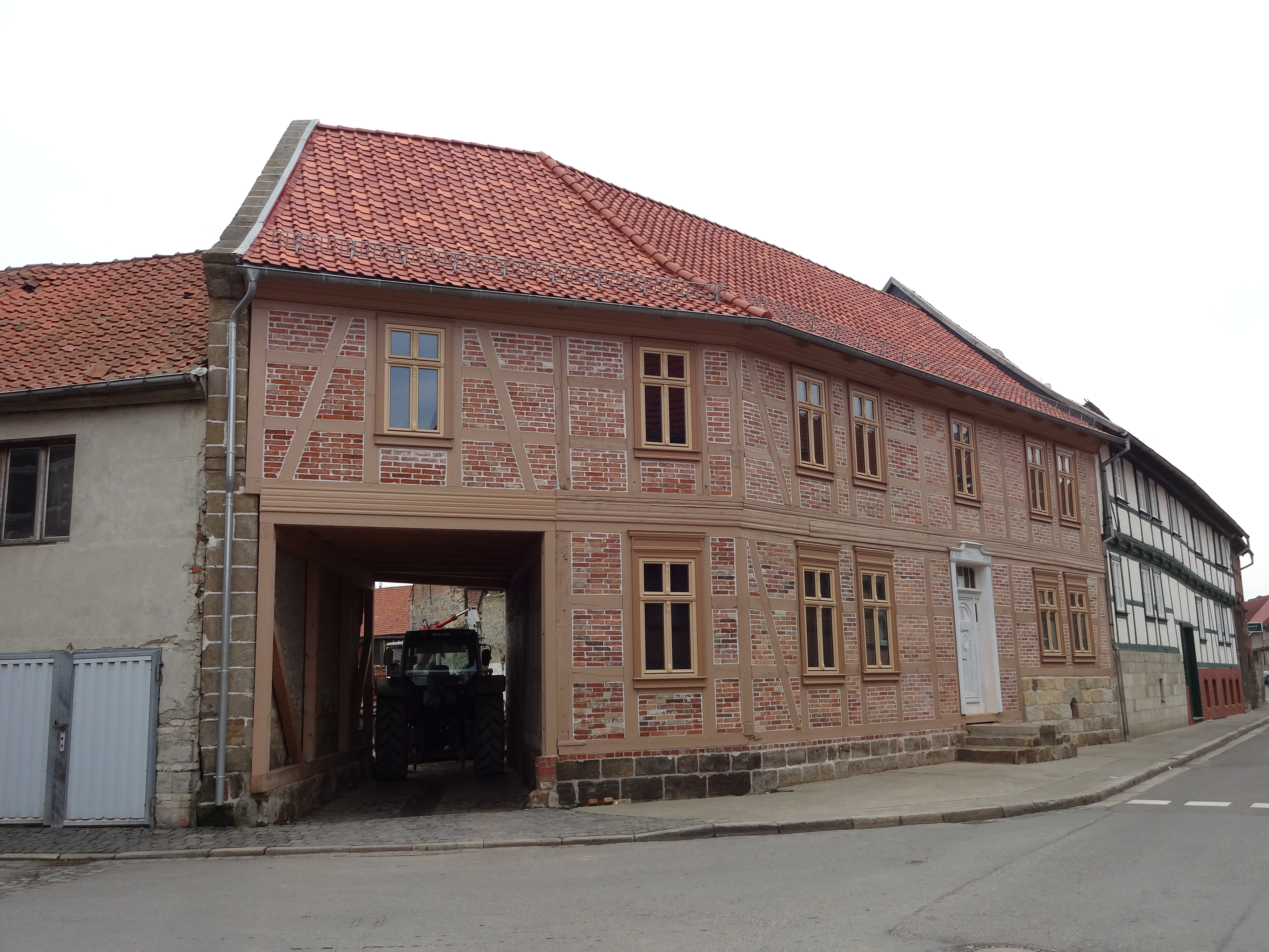 denkmalgeschütztes Fachwerkhaus (Ackerbürgerhaus) in der Kornstraße 18 in Derenburg, Ortsteil von Blankenburg (Harz)